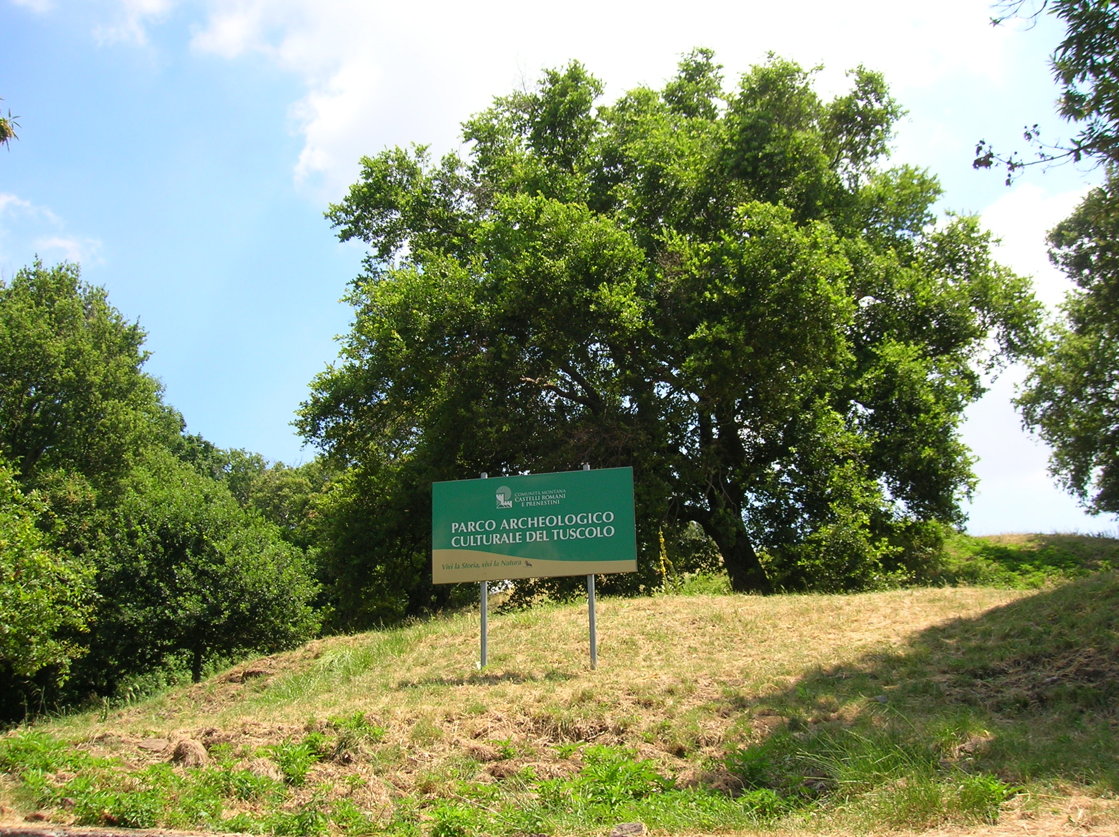 Cartello del Parco archeologico del Tusculum, Lazio, Italia.